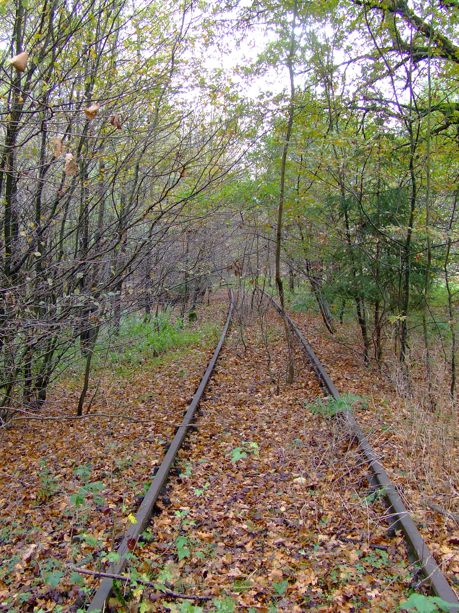 Aggertalbahn im Siegburger Wald, November 2006